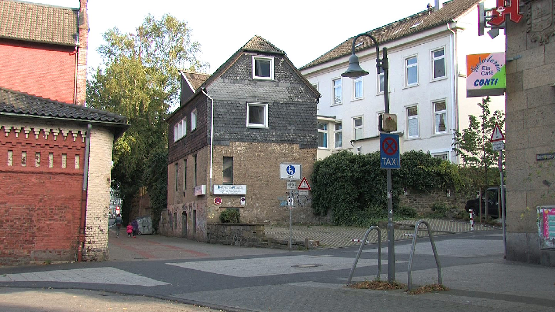 Ort des ersten jüdischen Friedhofs in Schwelm (bis ca. 1776): das Haus in Bildmitte (Hauptstrasse 53A) steht genau auf der ehemaligen Stätte. Links die alte Brauerei, rechts hinten Stammhaus Scherz; vorn Kreuzung Schulstrasse-Untermauerstrasse